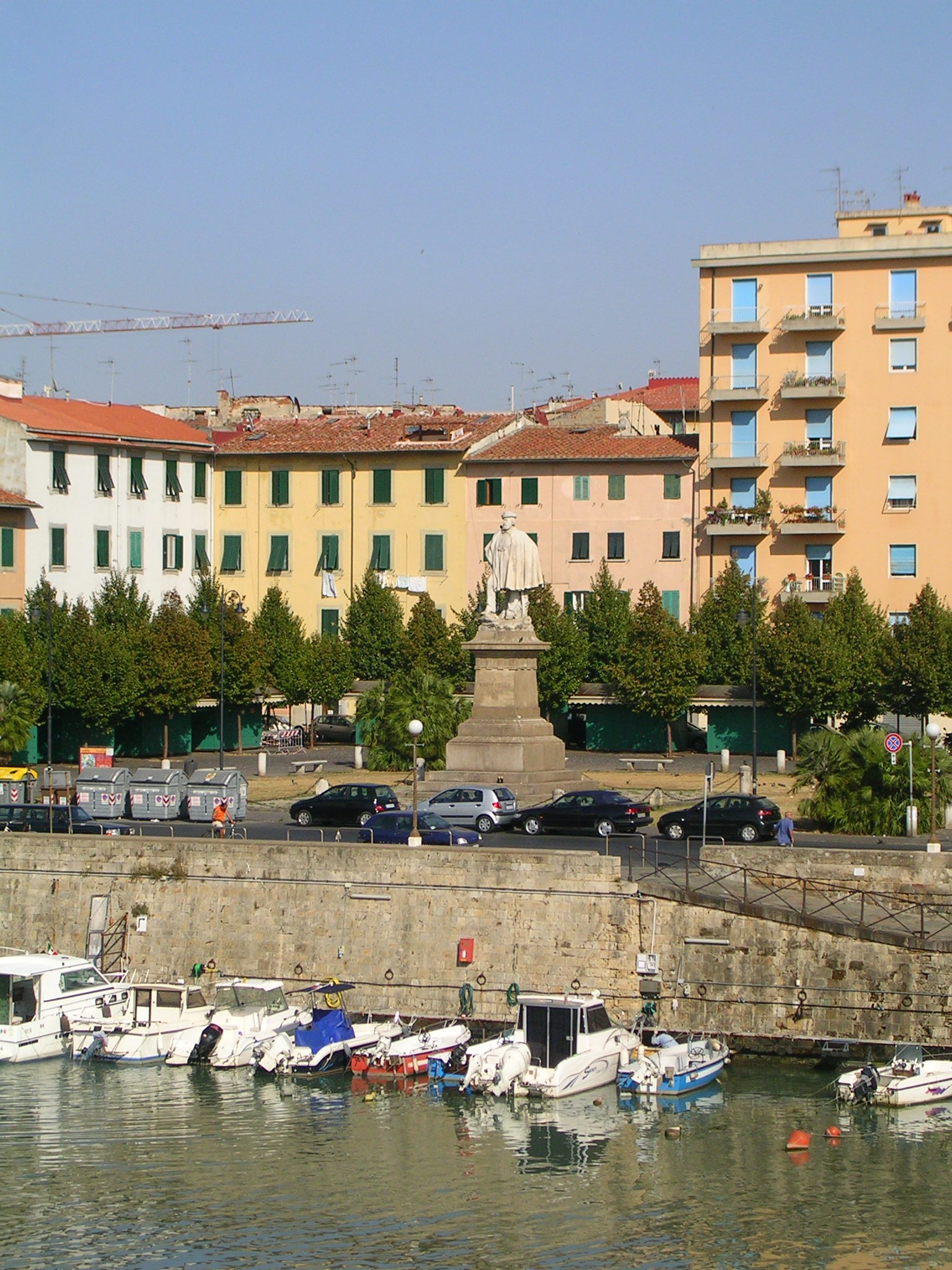 Livorno: Monumento a Giuseppe Garibaldi nell'omonima piazza.